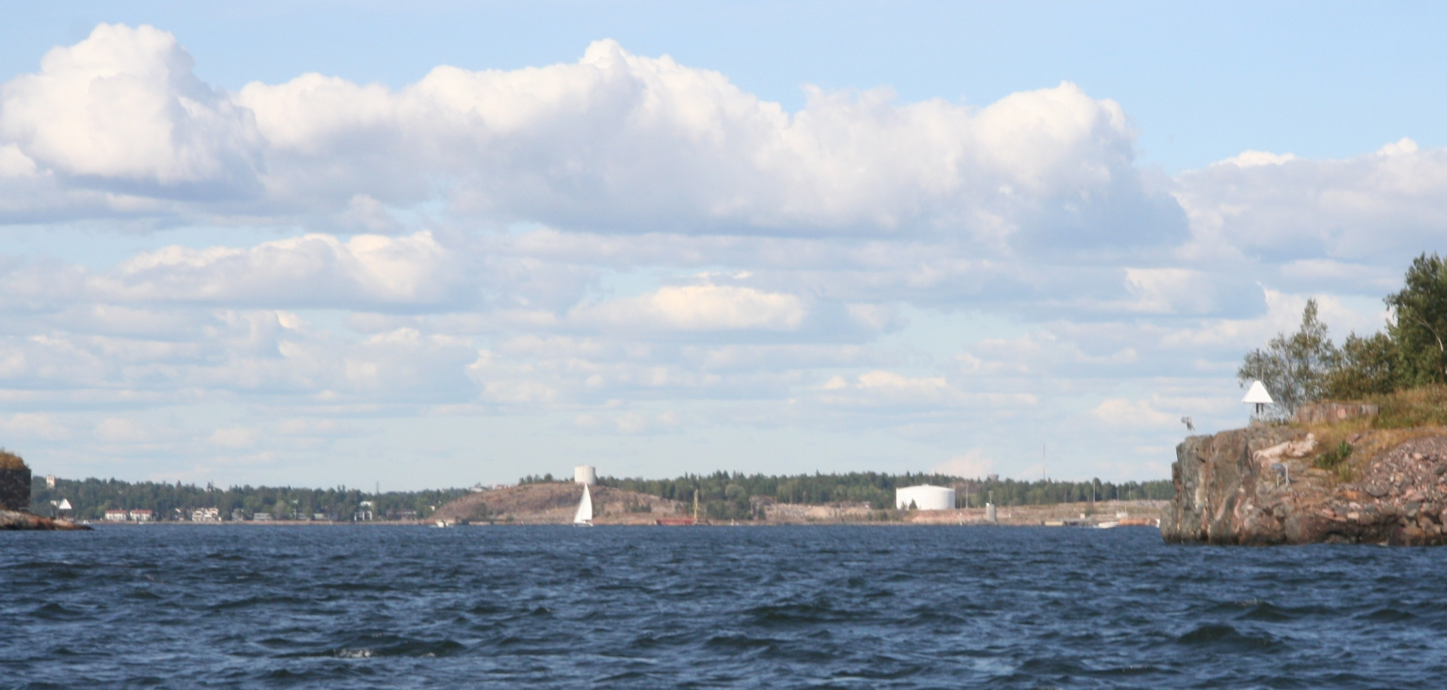 Näkymä Kruunuvuorenselälle Kustaanmiekasta. Oikealla Vallisaari, vasemmalla Suomenlinna.